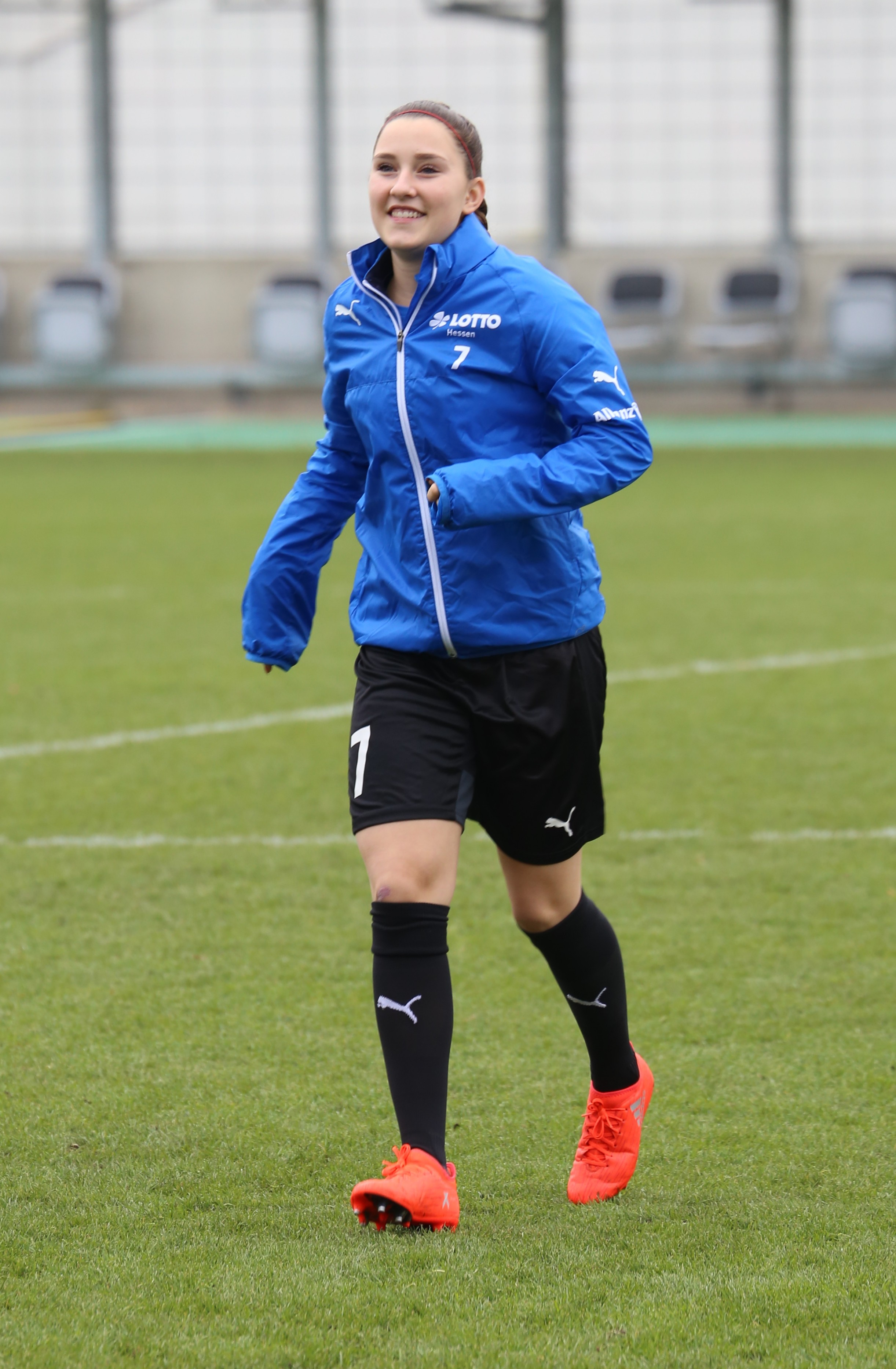 Isabella Möller (1. FFC Frankfurt) beim Frauen-Bundesliga-Spiel FC Bayern München gegen 1. FFC Frankfurt am 13. November 2016 im Stadion an der Grünwalder Straße, München (Ergebnis war 1:0).